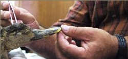 El Sr. Francisco Cancino preparando un ave solo como el lo sabe hacer, de la manera mas real y artistica.